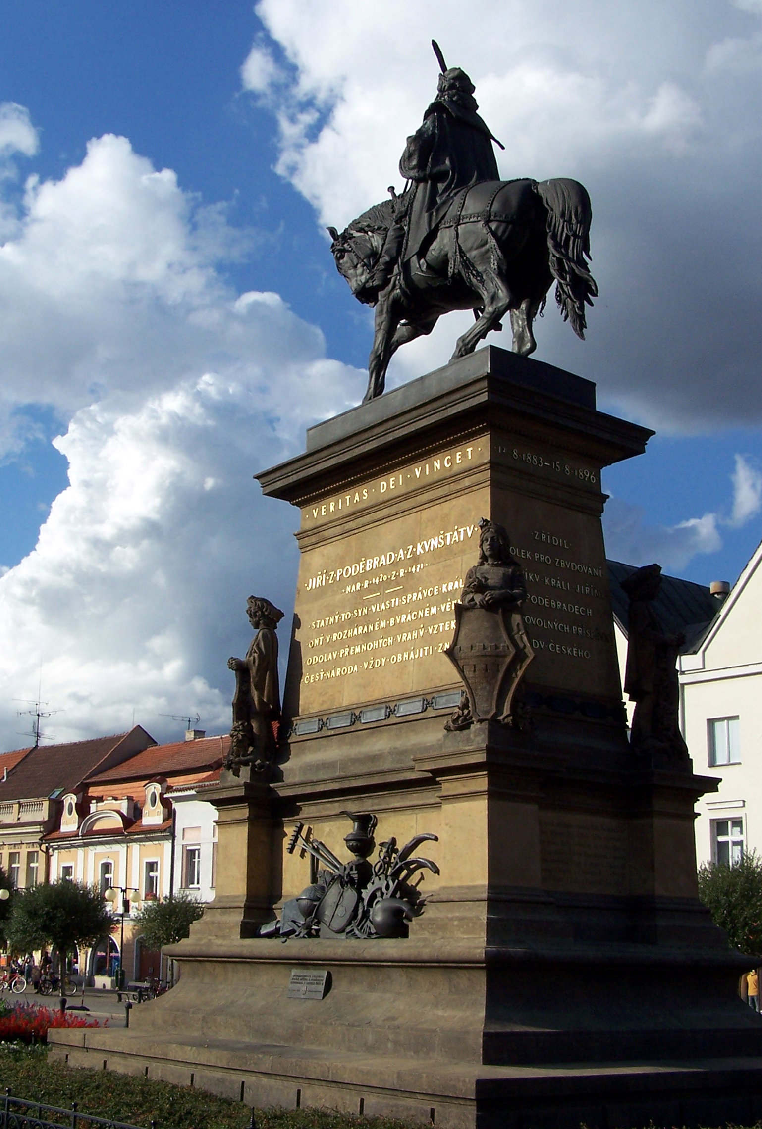 Pomník krále Jiřího od Bohuslava Schnircha, Poděbrady. Pohled od zámku.